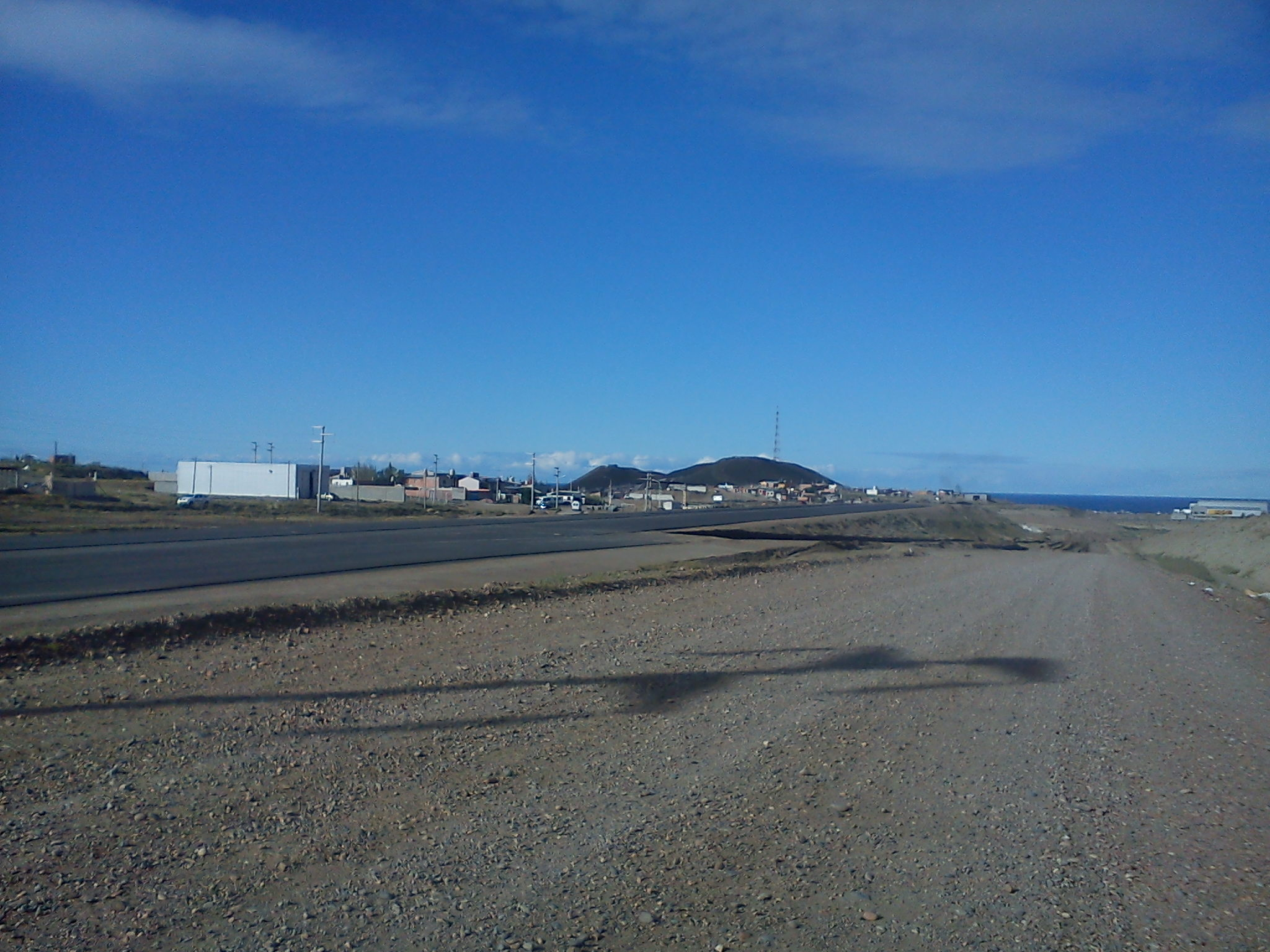 Vista a la construccion de la avenida